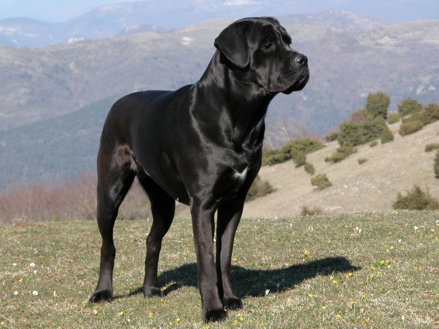 Cane corso femmina di nome Temi con orecchie integre